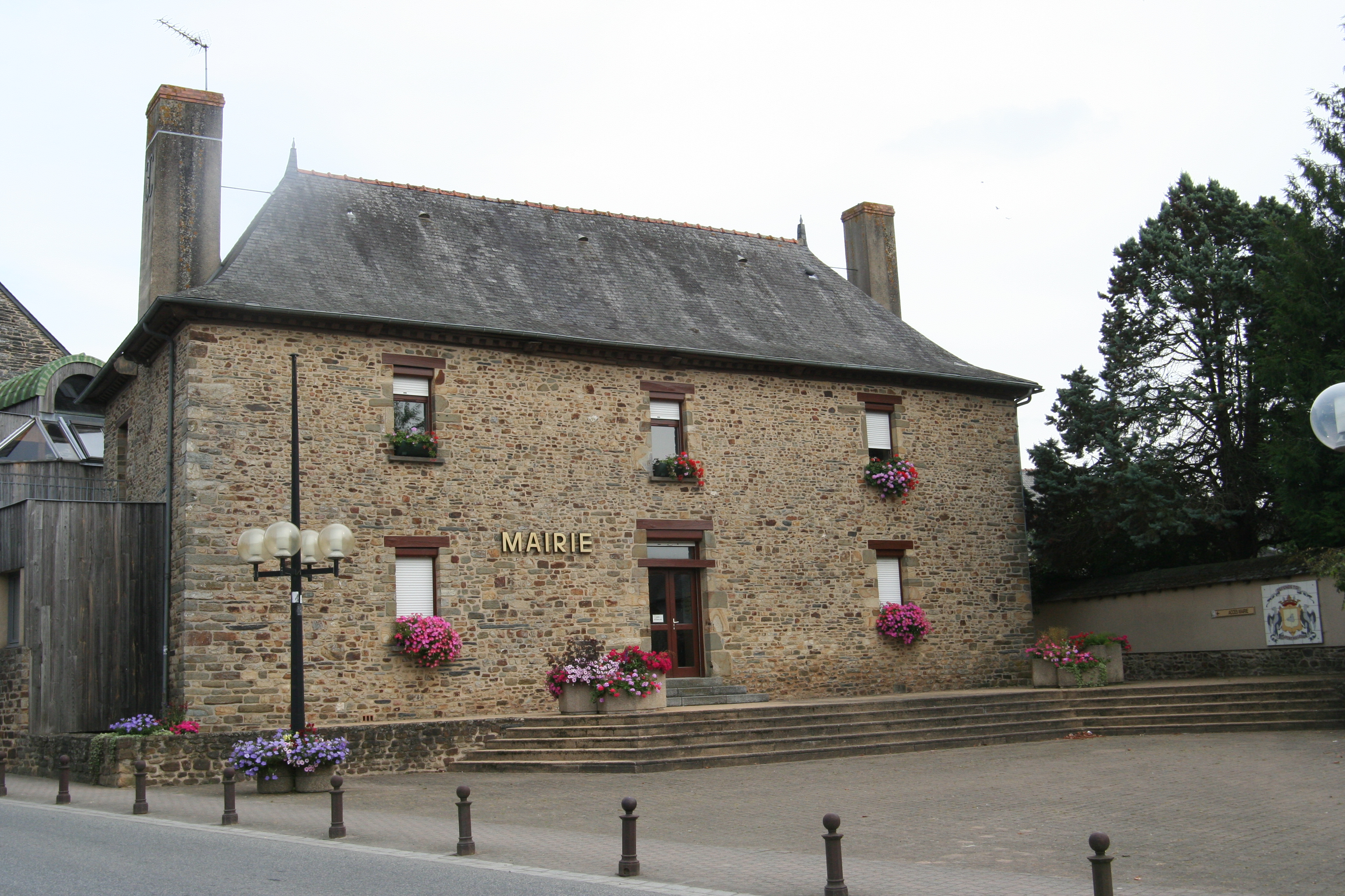 Mairie de Piré-sur-Seiche.